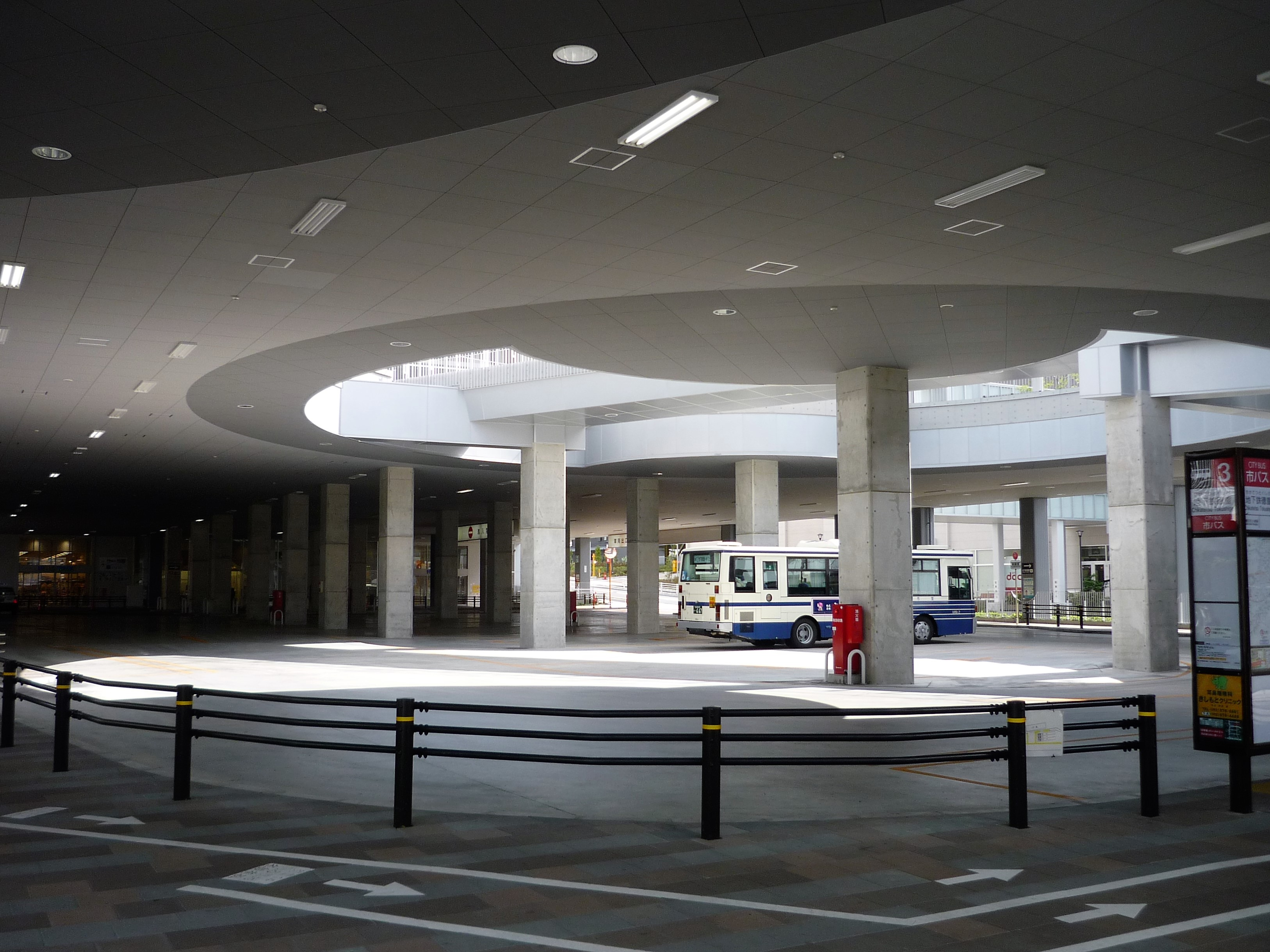 名古屋市営地下鉄徳重駅のバスターミナル